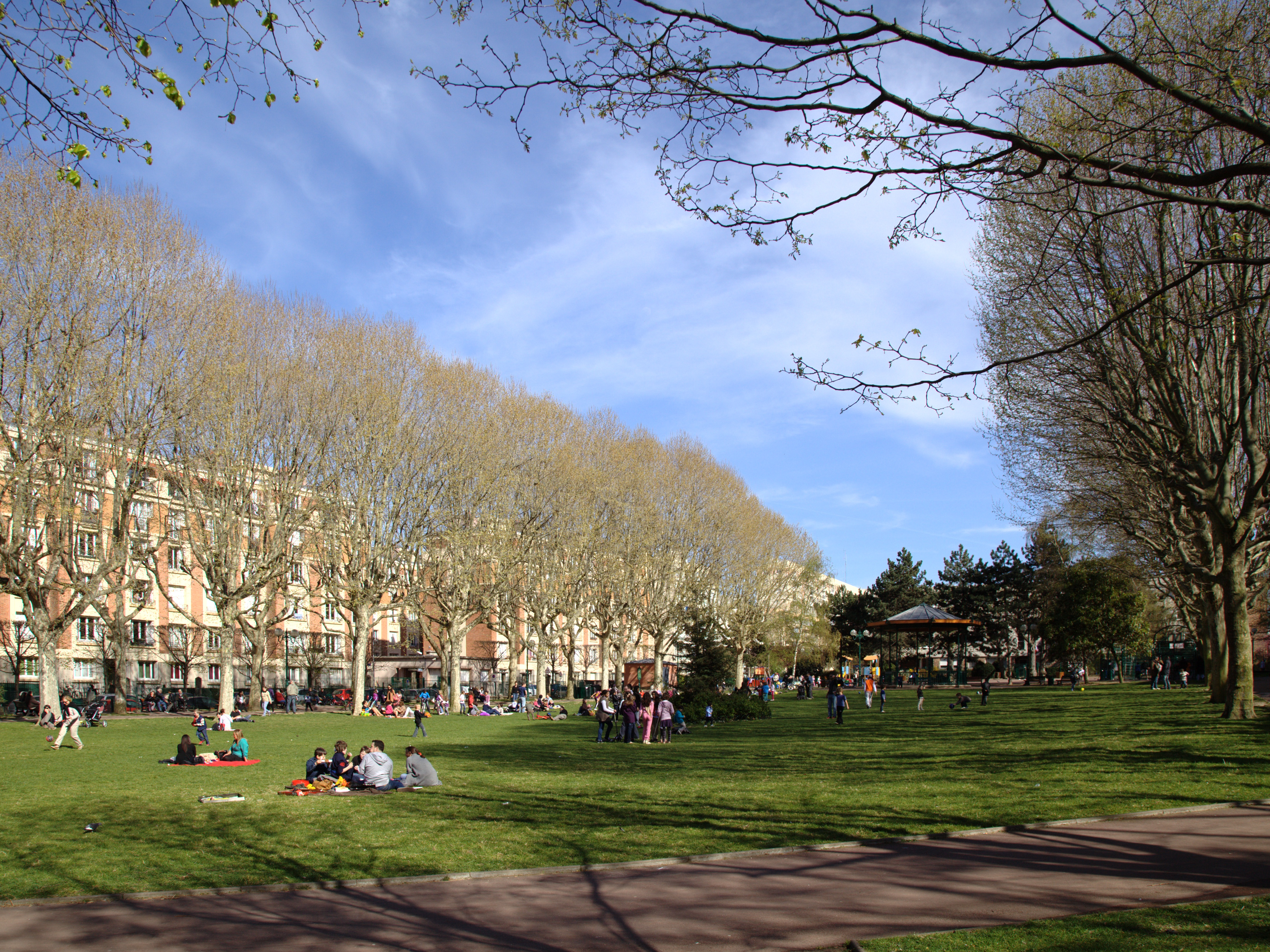 Le square Renaudel à Montrouge (92), vue en direction ouest